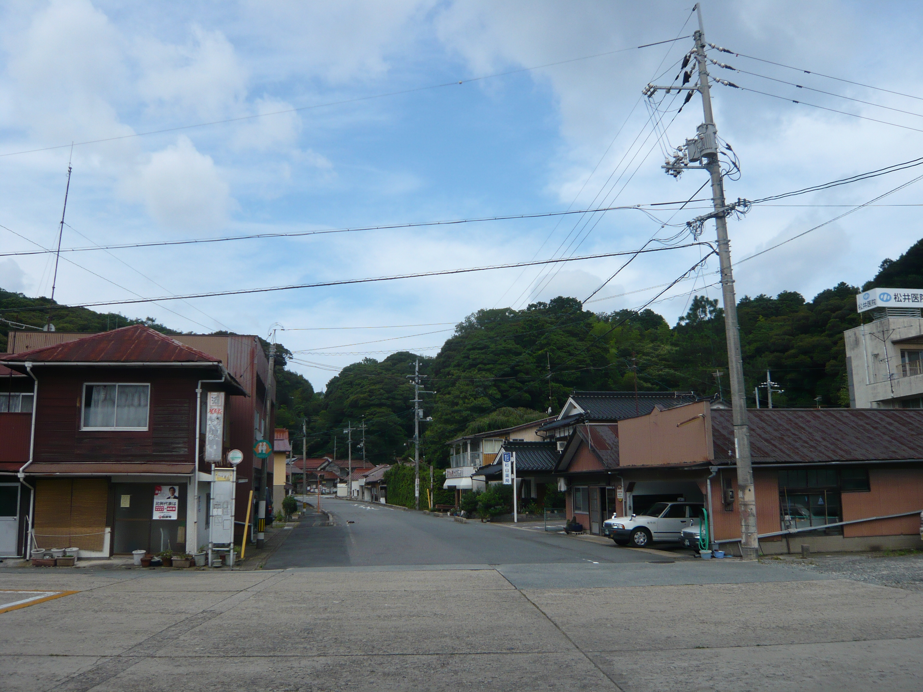 山陰線江崎駅前